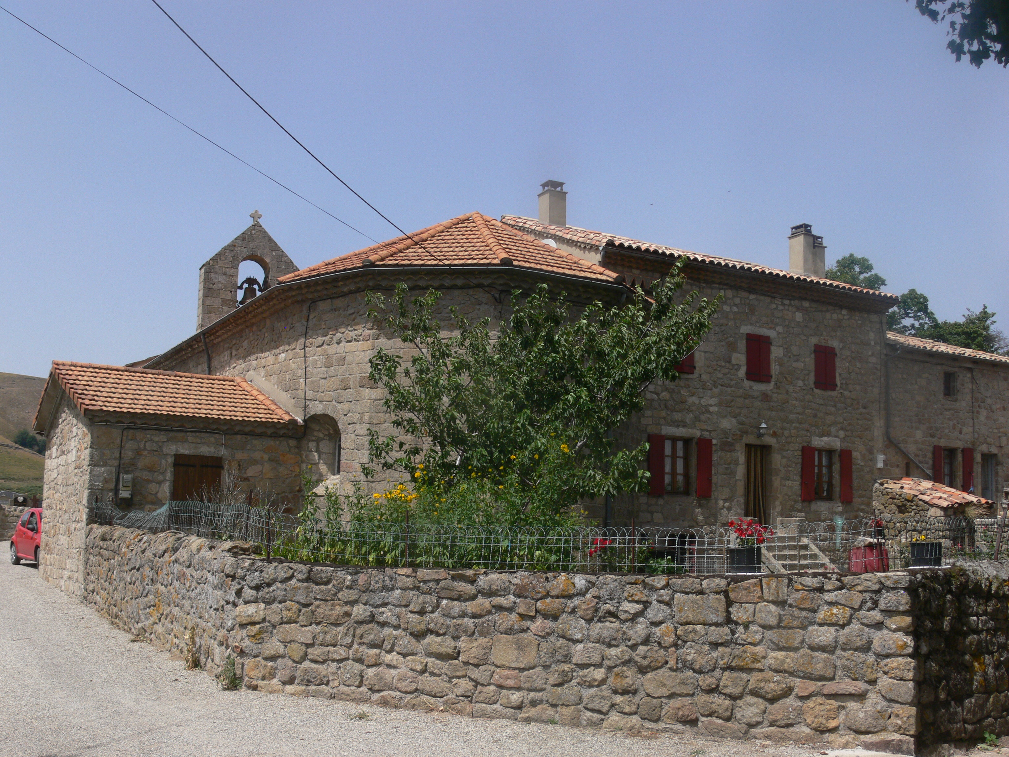 Ferme à côté de l'église d'Issamoulenc (Ardèche)